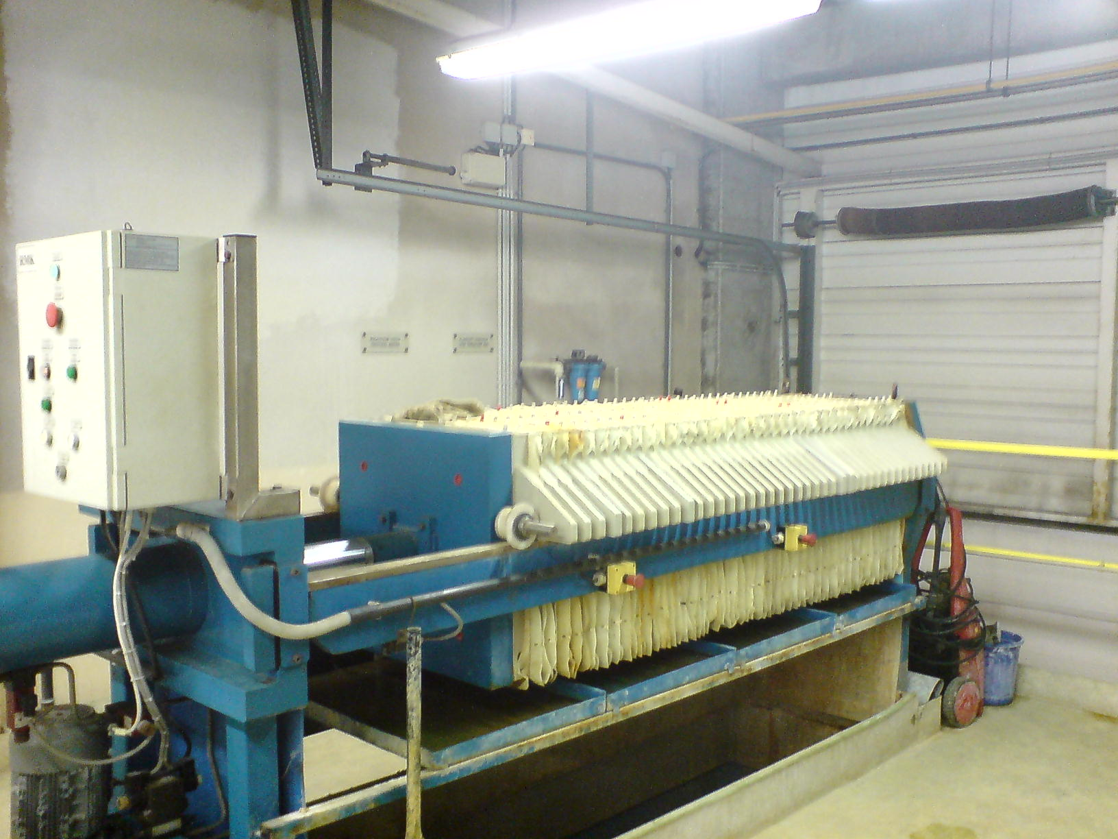 Kalolis v malé čistírně odpadních vod / Filter press